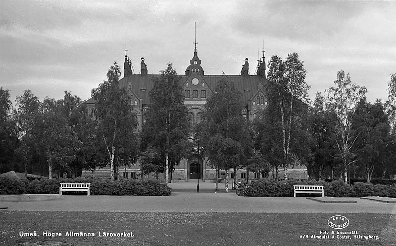 Högre Allmänna Läroverket.; Byggnadsverk; Skola; Utbildning och vetenskap